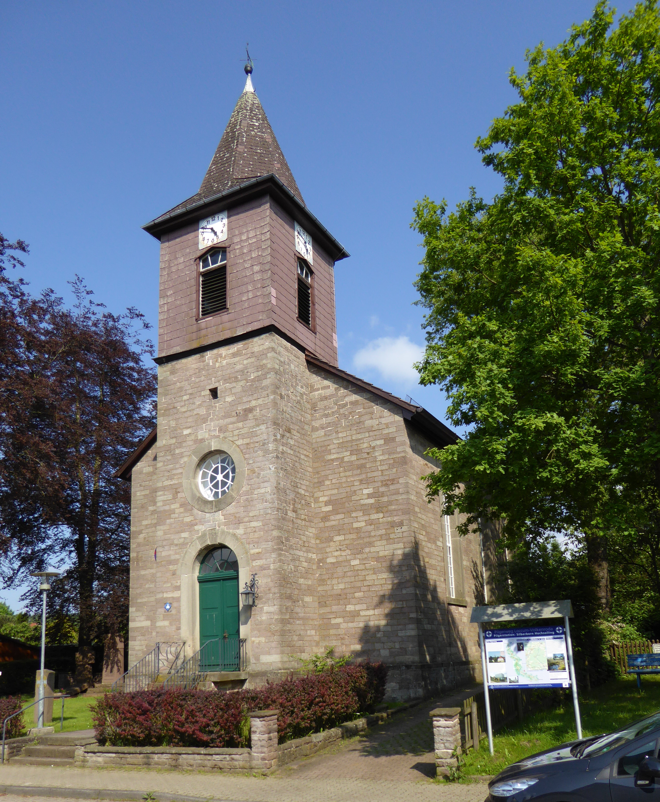 Ev.-luth. Markus-Kirche in Silberborn, Stadt Holzminden, Niedersachsen. Erbaut 1858-1860